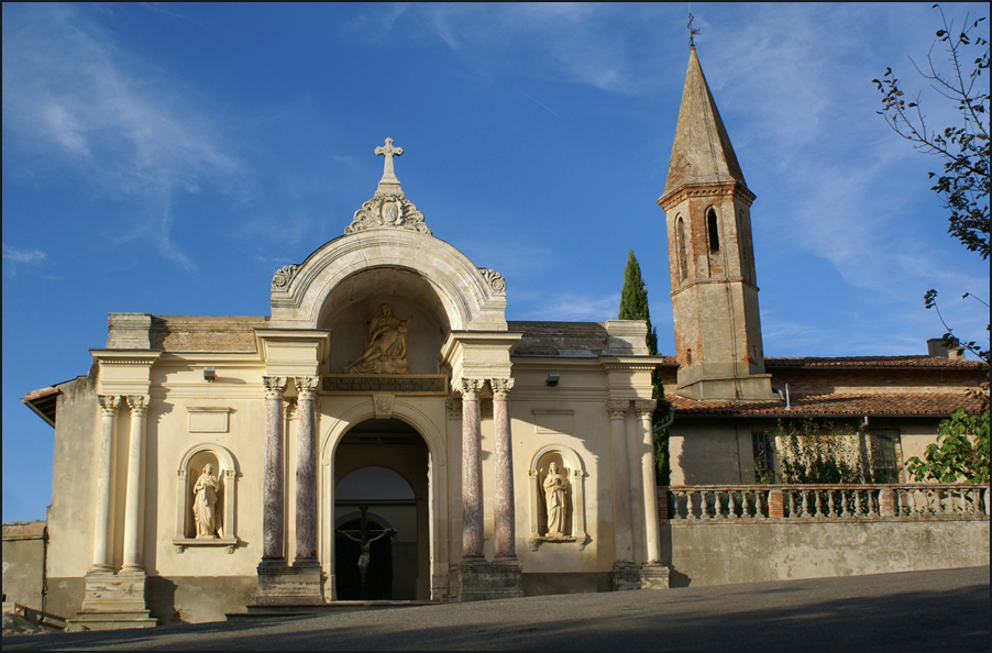 Chapelle de Notre-Dame d'Alet